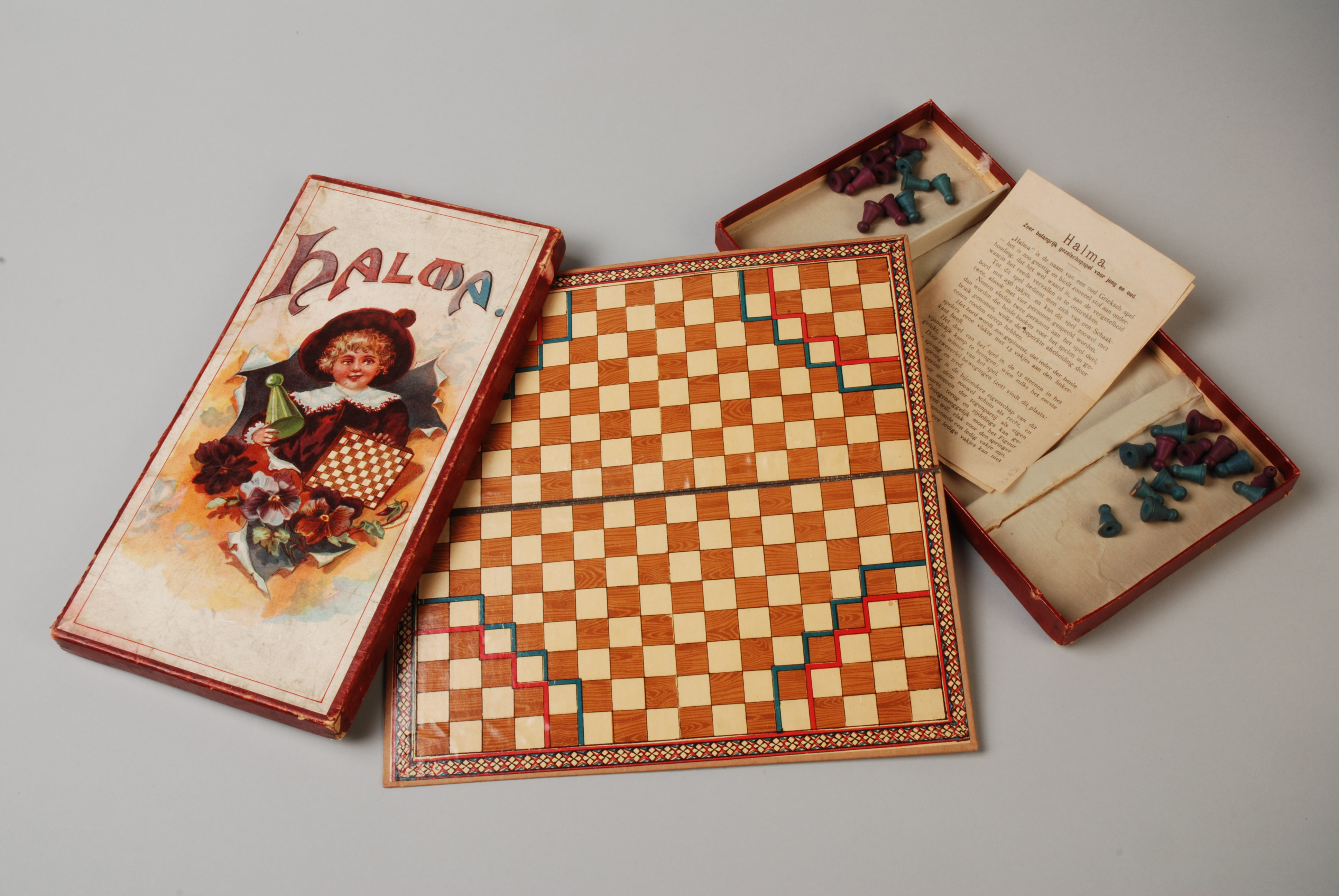 Objectgegevens Titel: Halma spel, in doos waarop kind met speelbord en pion: spelbord, blauwe en paarse pionnen, Nederlandse spelregels Beschrijving: Kind dat pion vasthoudt met halmabord en viooltjes. Trefwoorden: bordspel, gezelschapsspel, spel, ontspanningsmiddel Opschrift / merk: "Halma." Plaats vervaardiging: Duitsland? Datering: 1890 - 1900 Materiaal: karton, papier, hout Afmetingen: (cm) hg 2,5 / br 16,0 / dp 31,0 Associatie: spel, kind, spelen Vorm & decoratie: figuur, kind Inventarisnr: Museum Rotterdam 76931